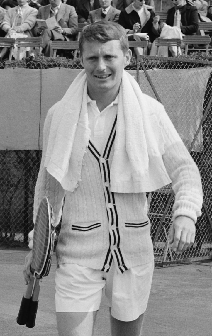 Tennis Noordwijk, Richardson